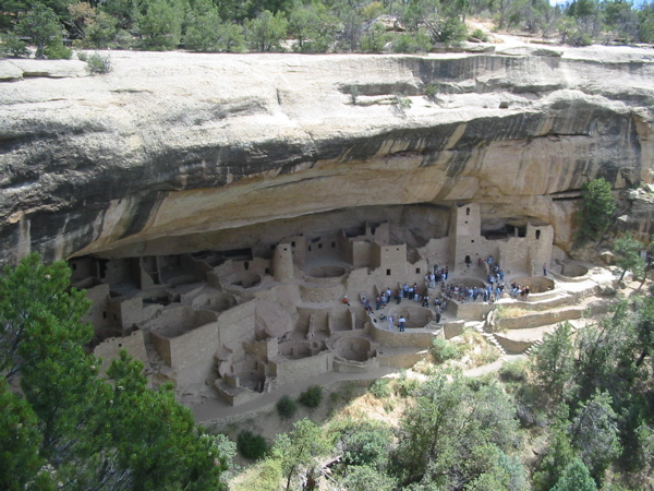 España, Alicante